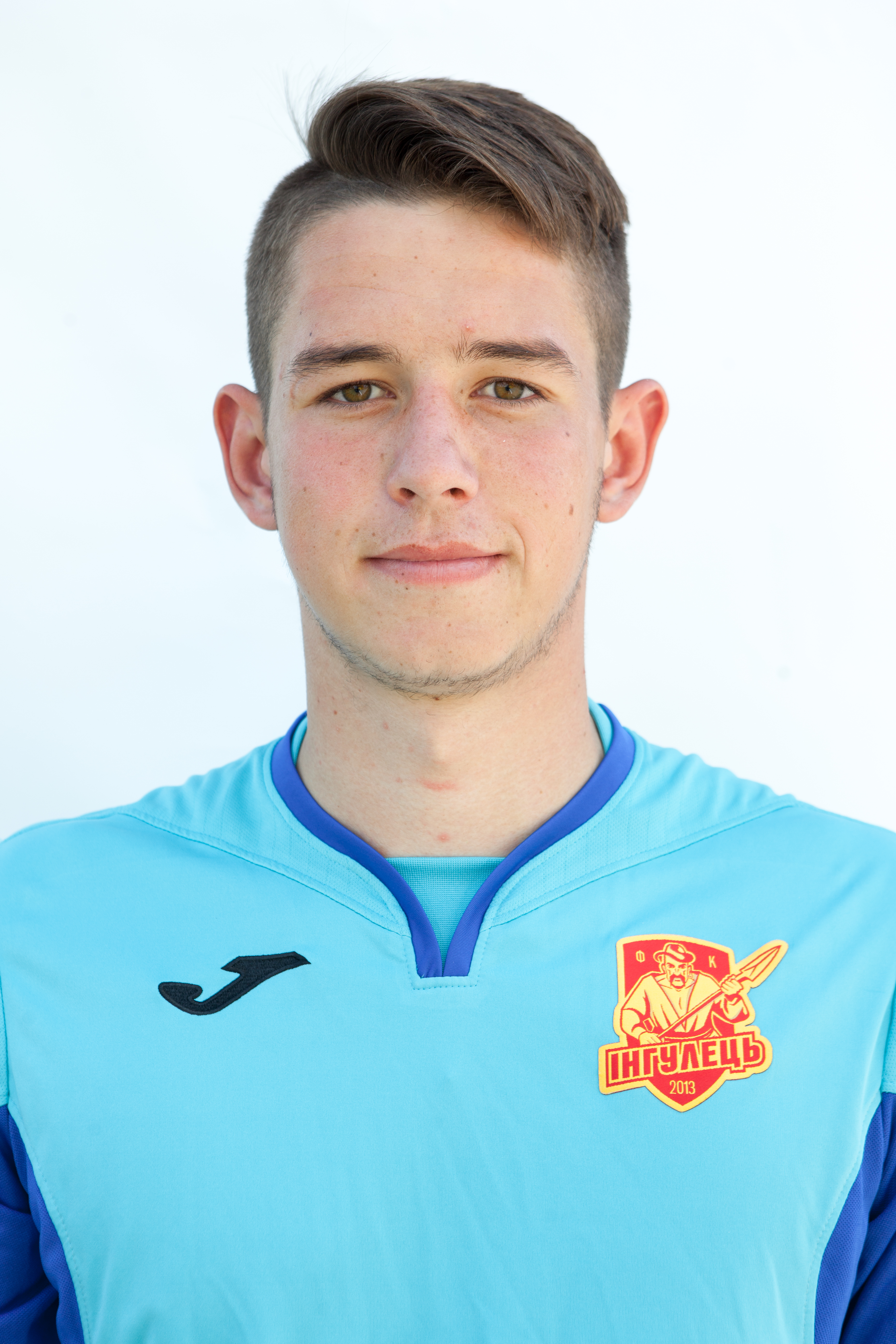 Шухман Богдан Володимирович - голкіпер ФК "Інгулець"